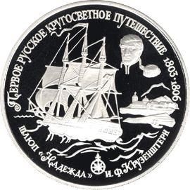 Первое русское кругосветное плавание: Шлюп «Надежда» — И.Ф.Крузенштерн